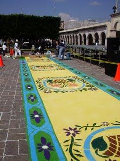 Elaboración de un tapete de aserrín en el atrio de la Parroquia de San Miguel como parte de los festejos de "La Octava", culminación de las fiestas de San Miguel Arcángel: Patrono de Uriangato.